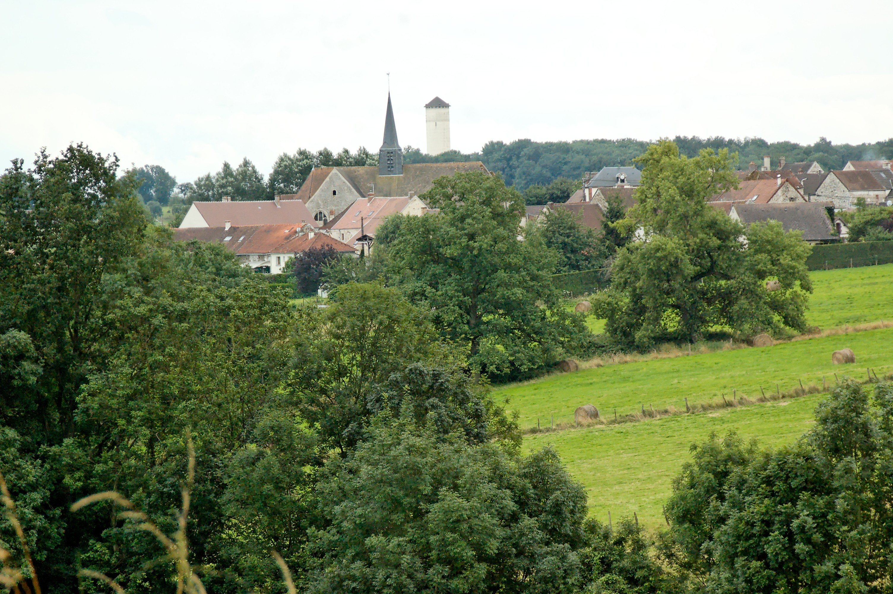 Panorama de Courboin.